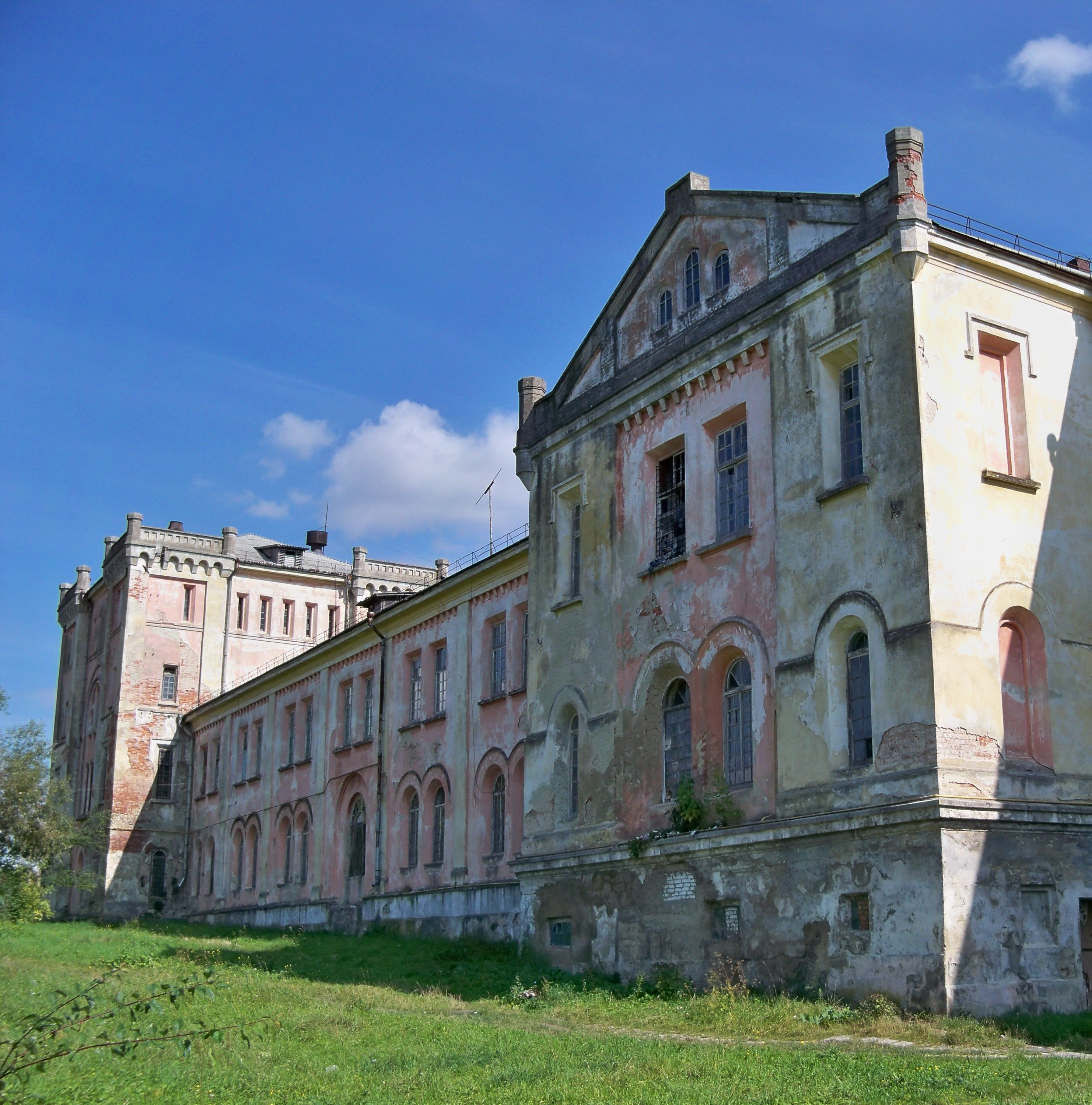 Адмінбудинок благочинного закладу п.Скарбка, Заклад